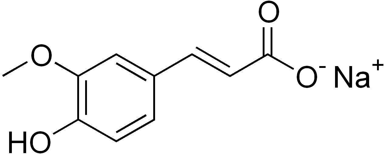 chemical structure of sodium ferulate